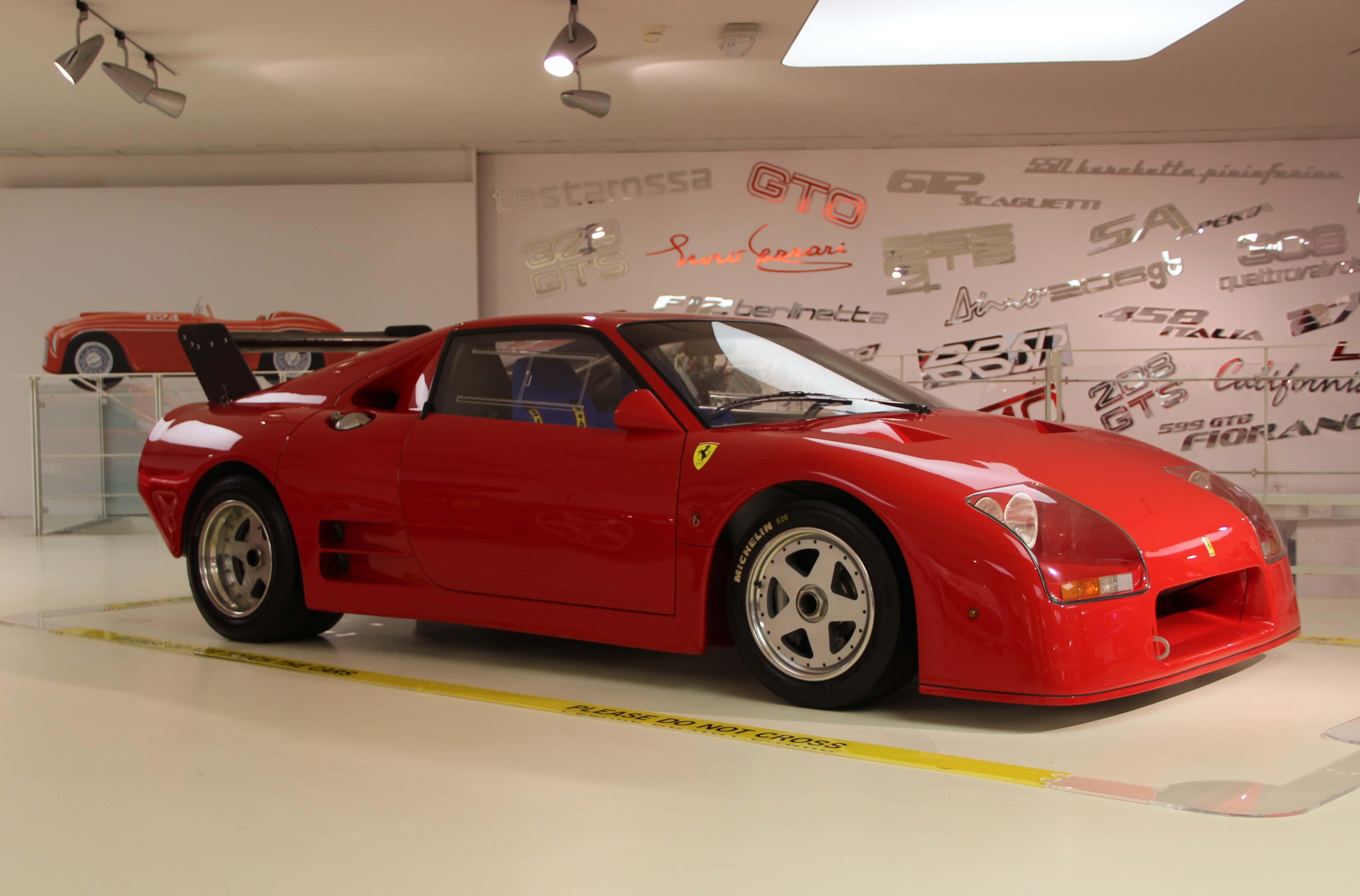 Ferrari-Museum Maranello